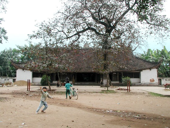 Đình Thổ Tang, thị trấn Thổ Tang, huyện Vĩnh Tường, tỉnh Vĩnh Phúc, Việt Nam. The Thổ Tang communal house, Thổ Tang town, Vĩnh Tường district, Vĩnh Phúc province, Vietnam.